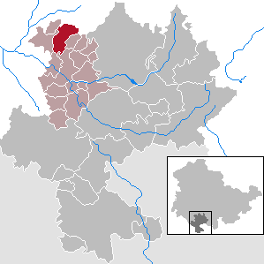 Oberstadt in Thuringia - district Hildburghausen